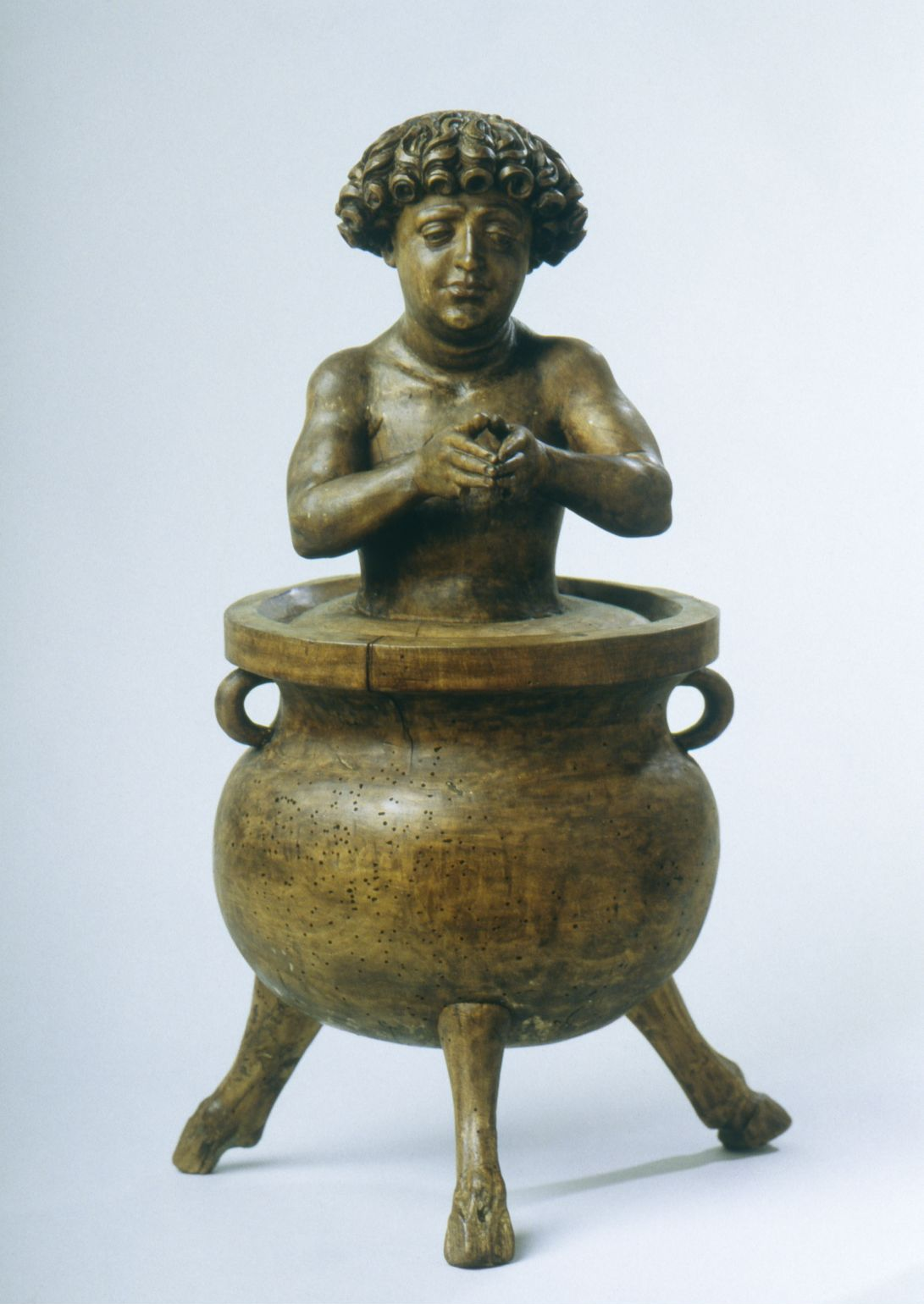 Statue des Heiligen Veit im Ölkessel, befindlich im Germanischen Nationalmuseum in Nürnberg. Um 1520 aus Lindenholz gefertigt von Veit Stoß. Siehe auch